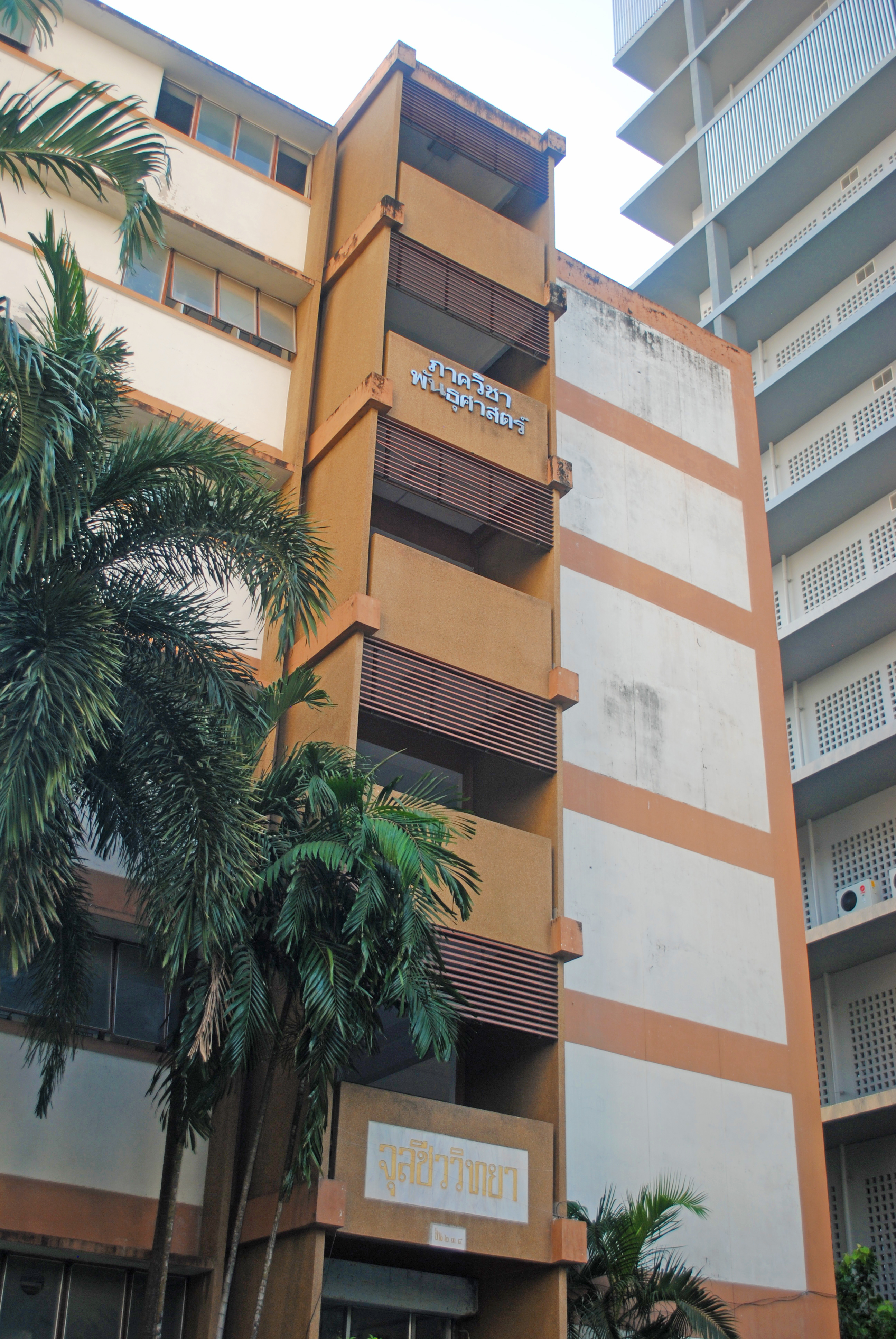 ตึกจุลชีววิทยา-พันธุศาสตร์ คณะวิทยาศาสตร์ มก.